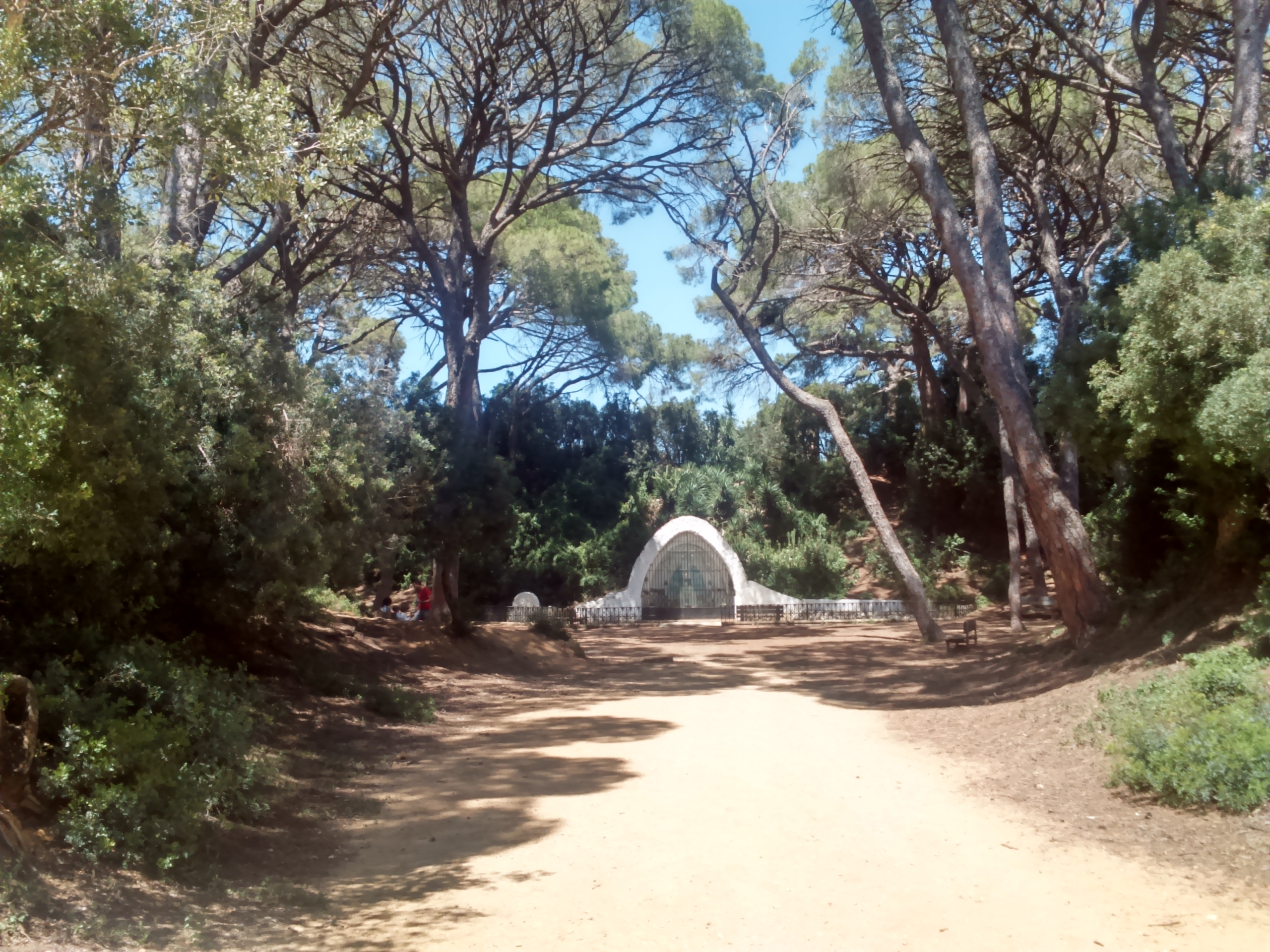 Vista de la Gruta de la Virgen de Lourdes, en el Parque de Las Canteras, en Puerto Real, España